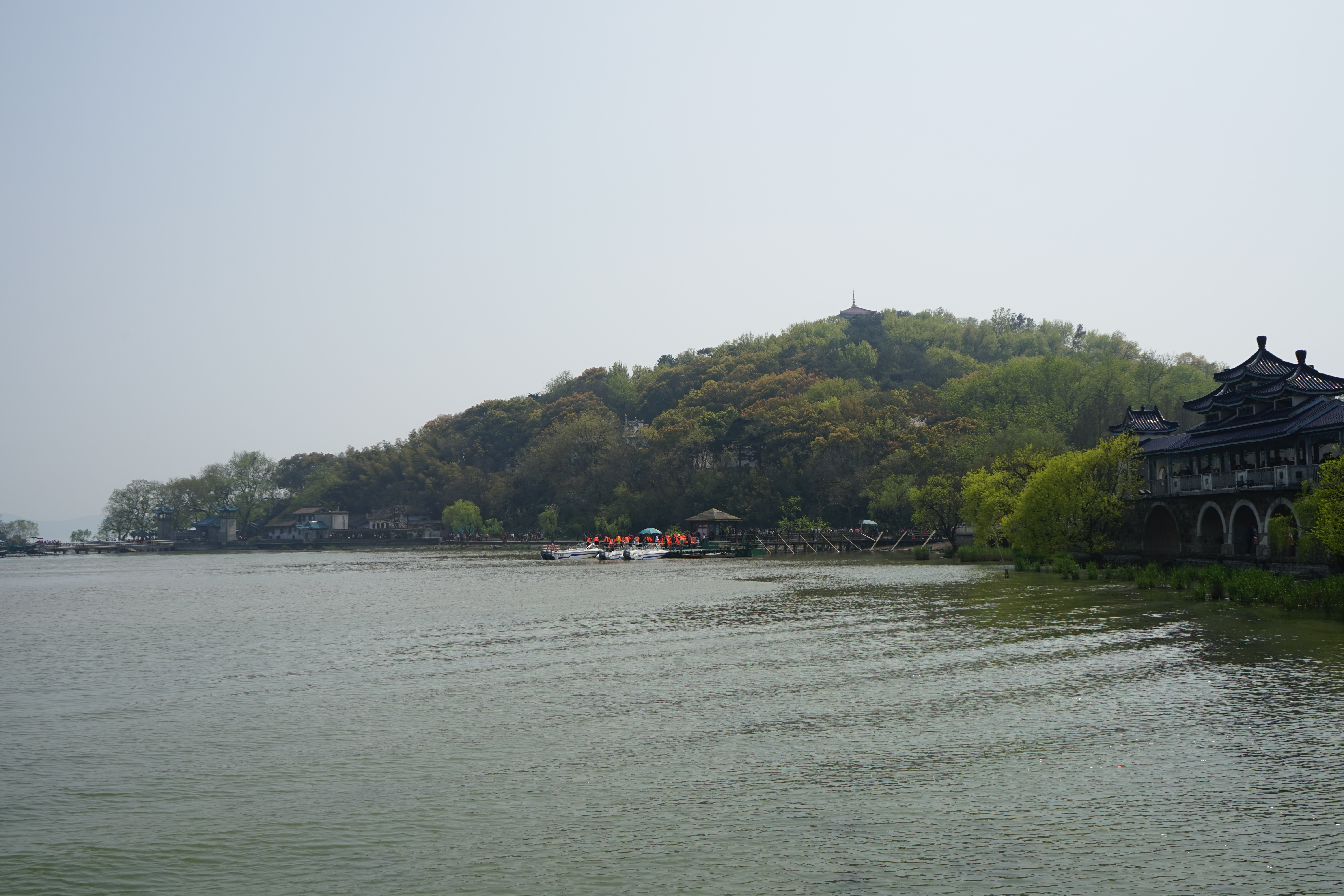 太湖仙岛（三山岛）